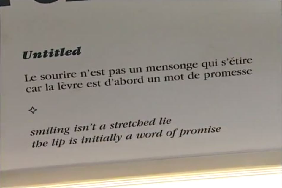 Poème de Laurent Poliquin publié dans le système de transport urbain de Winnipeg en 2003.